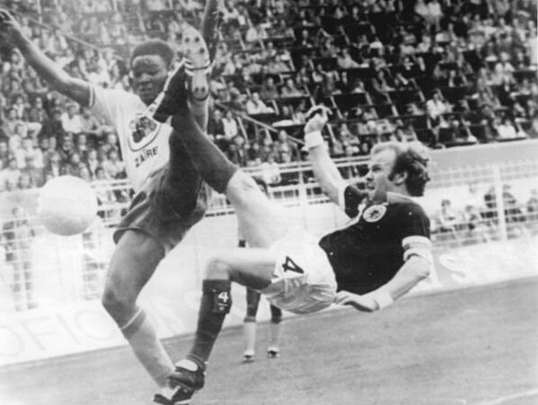 ADN-ZB-AP-Tele-14.6.74-ma-BRD-Dortmund: X. Fußball-Weltmeisterschaft-1. Finalrunde, Gruppe 2: Zaire - Schottland 0:2- Im rasanten Zweikampf Maku Mayanga (Zaire-links) und Billy Bremner (Schottland-rechts).